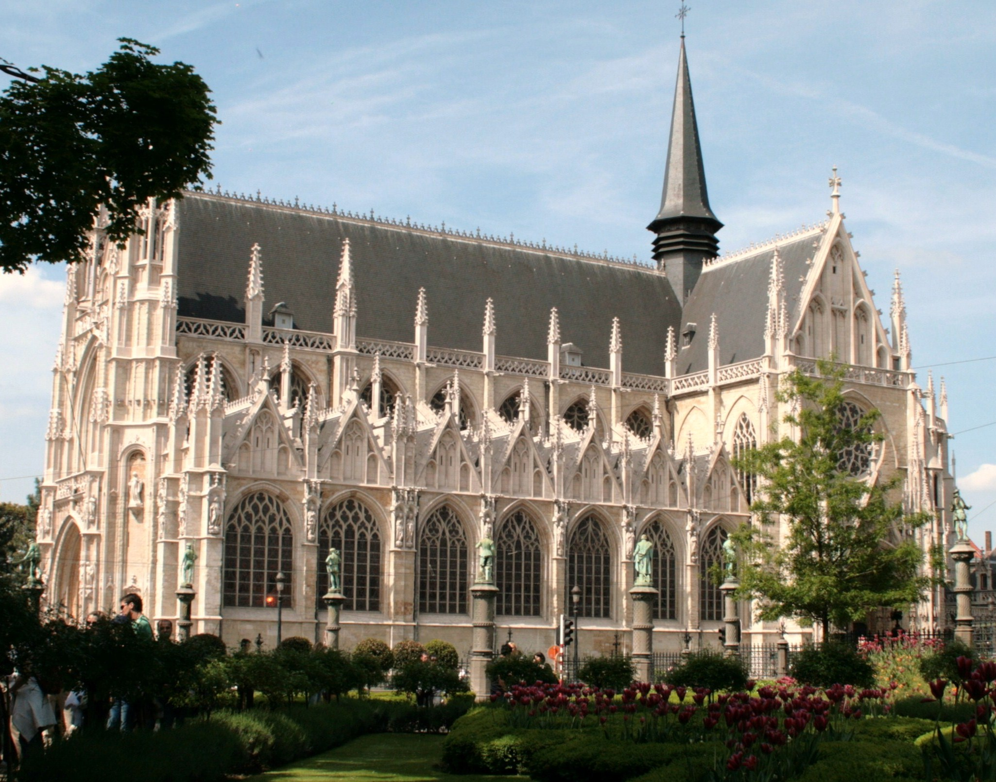 Церковь Нотр-Дам дю Саблон (Брюссель)